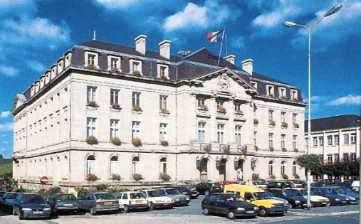 Mairie de Guéret